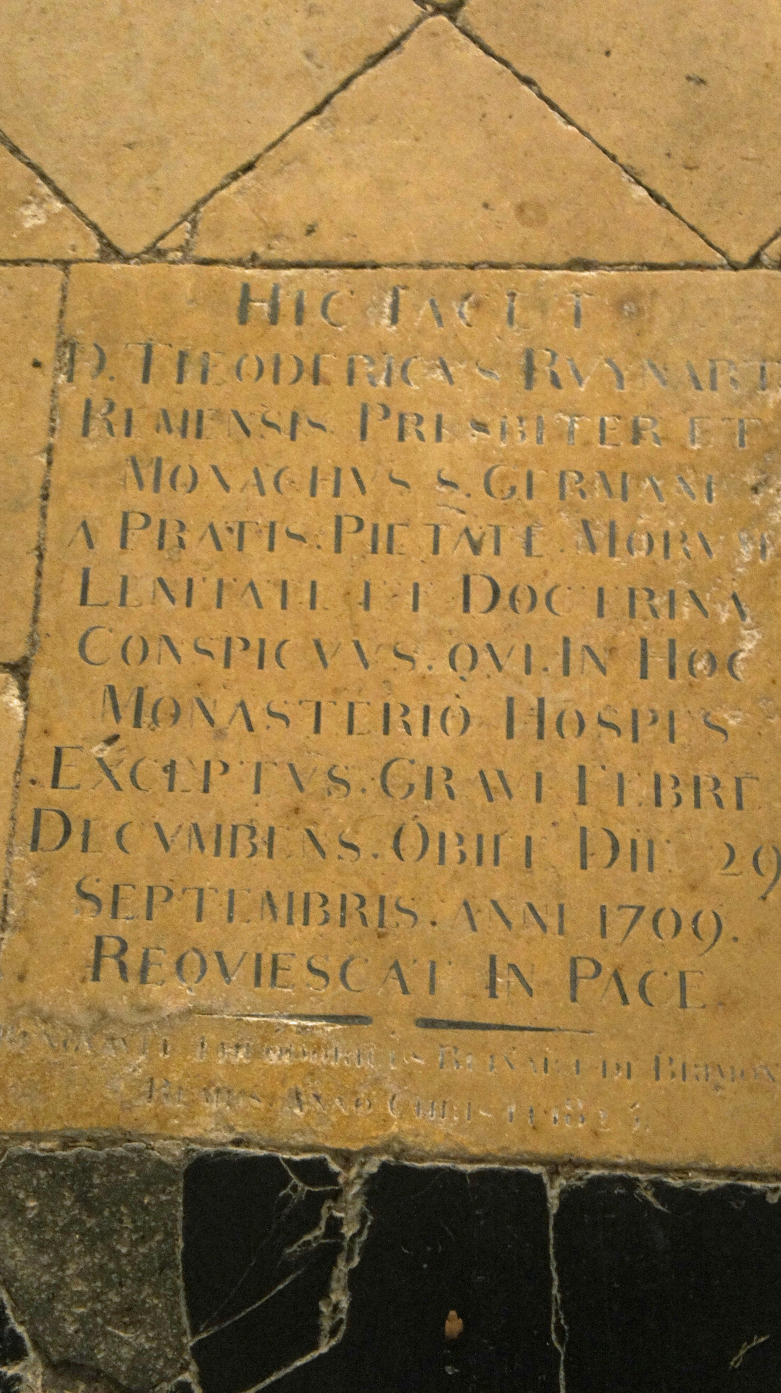 plaque à dom Ruinart en l'abbaye d'Hautvillers.